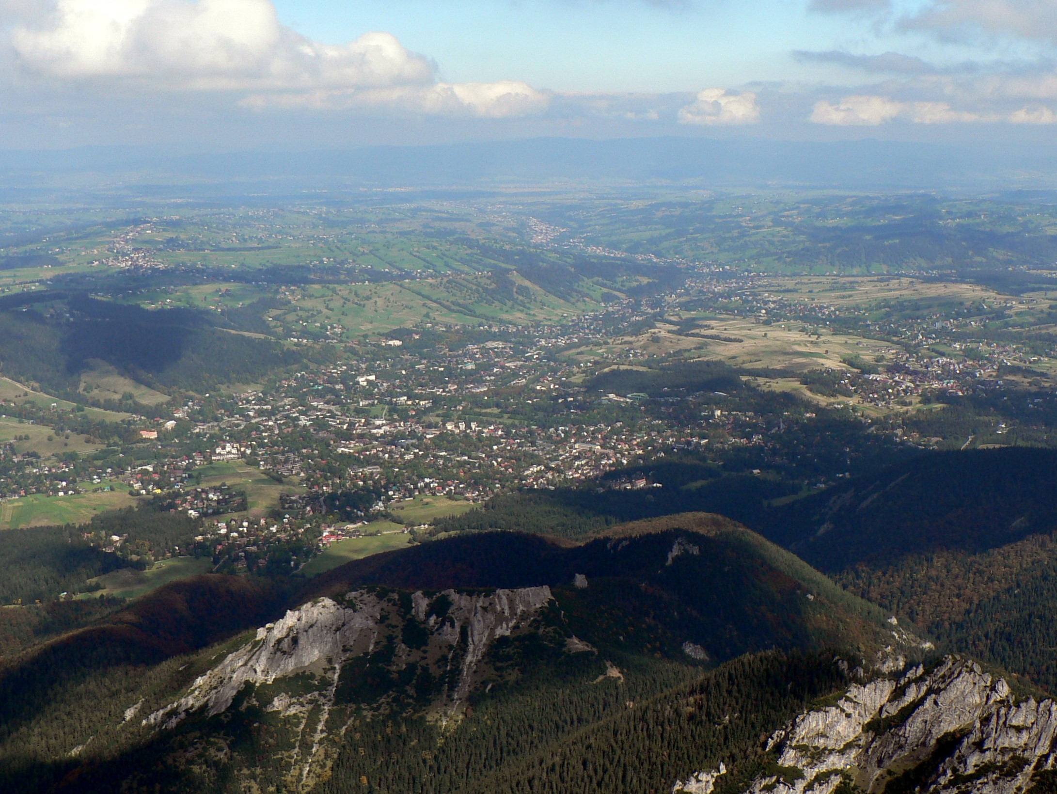 Sarnia Skała, Krokiew i Dolina Bystrej z Giewontu, w tle Zakopane